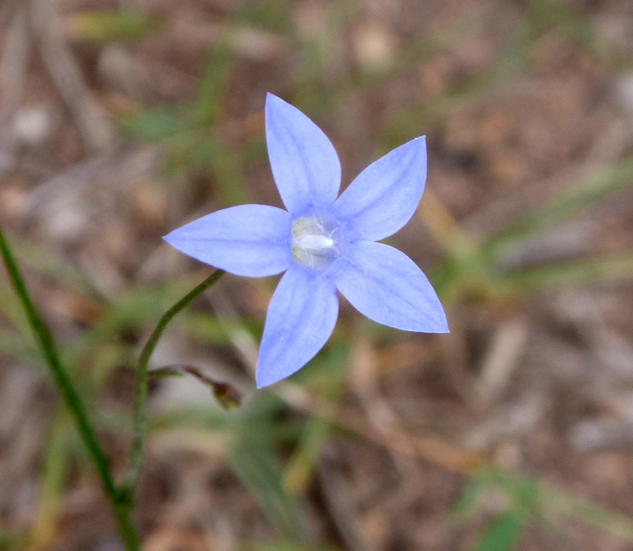 Bluebell. Wahlenbergia stricta. Campanulaceae